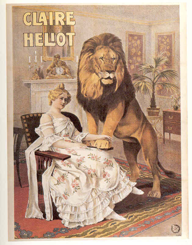 Claire Heliot Farblitho, 95×71 cm Druckvermerk mit Signet Nr. 2586